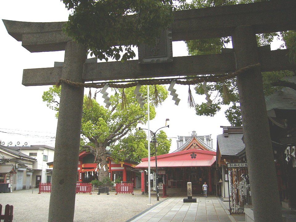 服部天神宮 鳥居から境内を西望 右手正面が服部天神宮、左手が豊中えびす神社